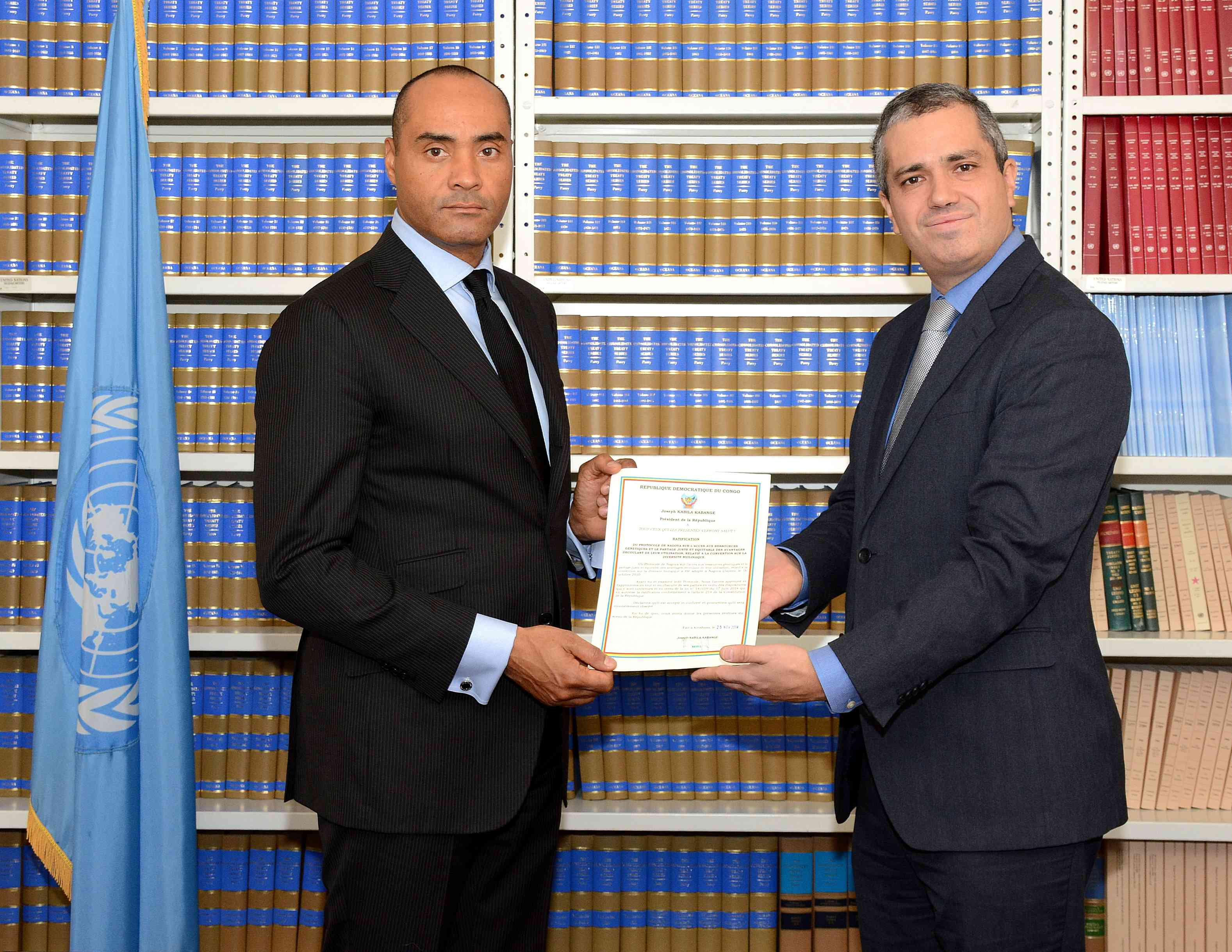 Mr. Frank Mwe di Malila Vice-Minister for International Cooperation and Regional Integration of the Democratic Republic of the Congo, United Nations